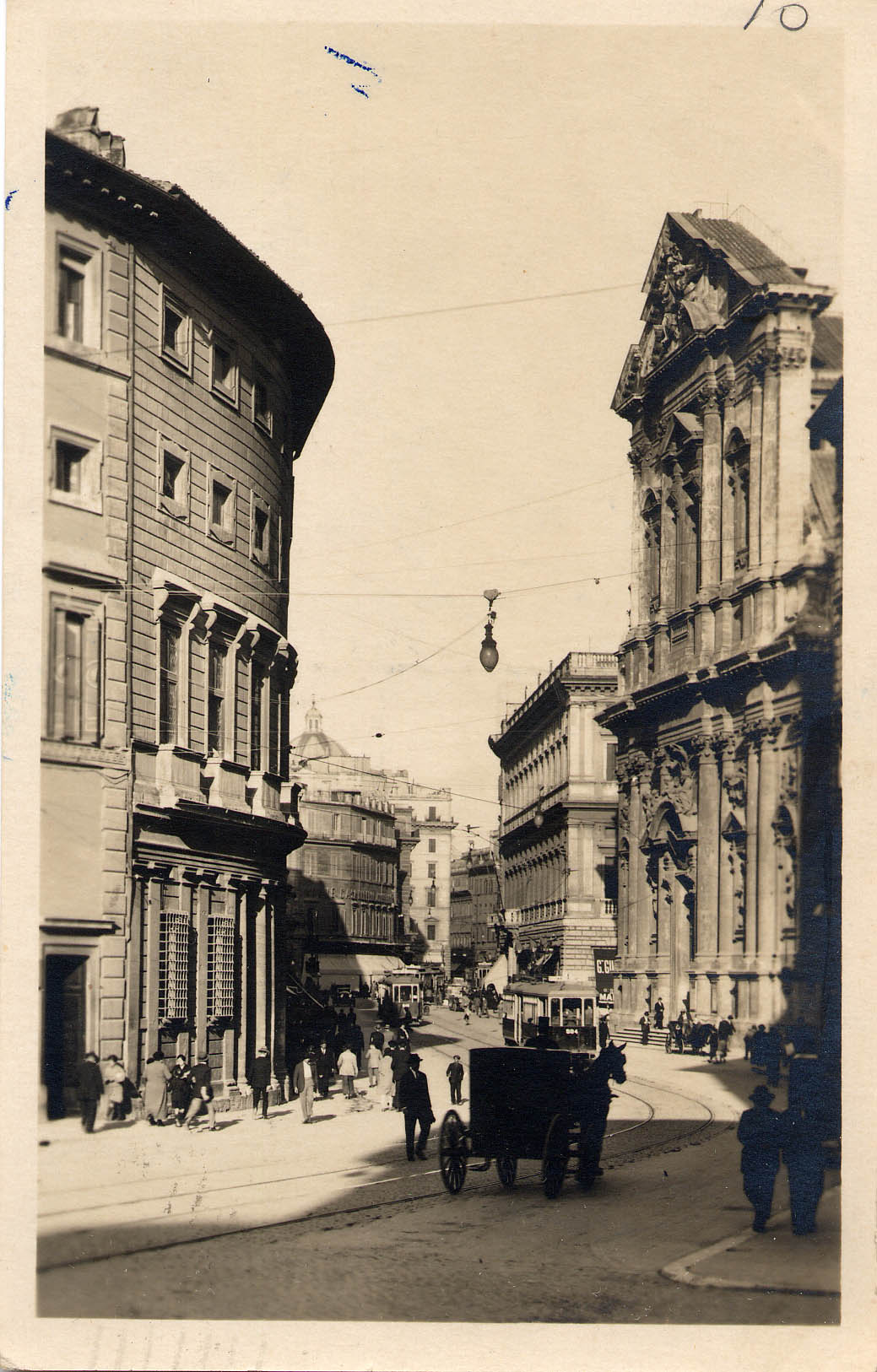 tram srto